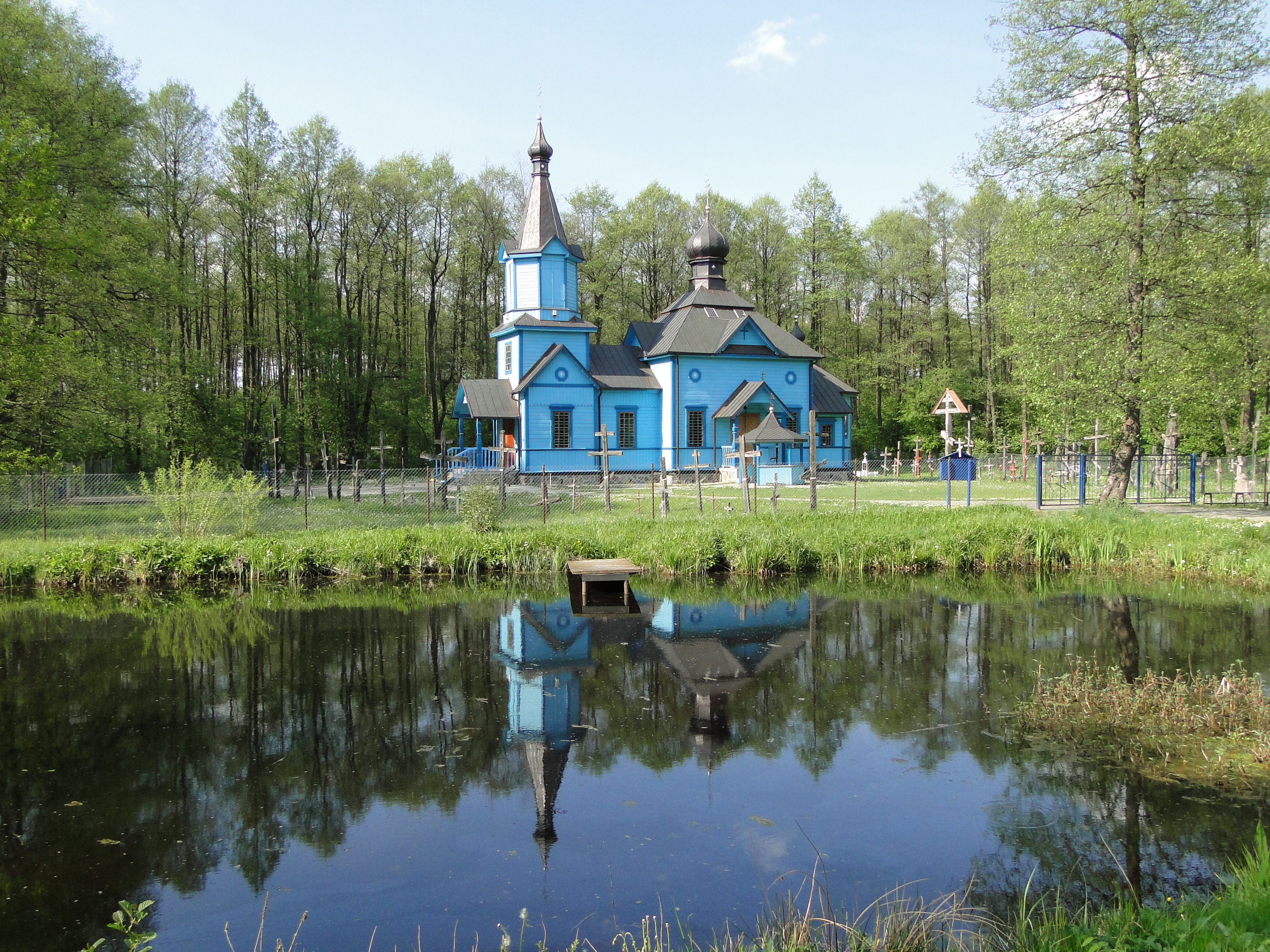 Koterka - cmentarna cerkiew prawosławna parafialna pw. Matki Boskiej Wszystkich Strapionych Radość, 1912